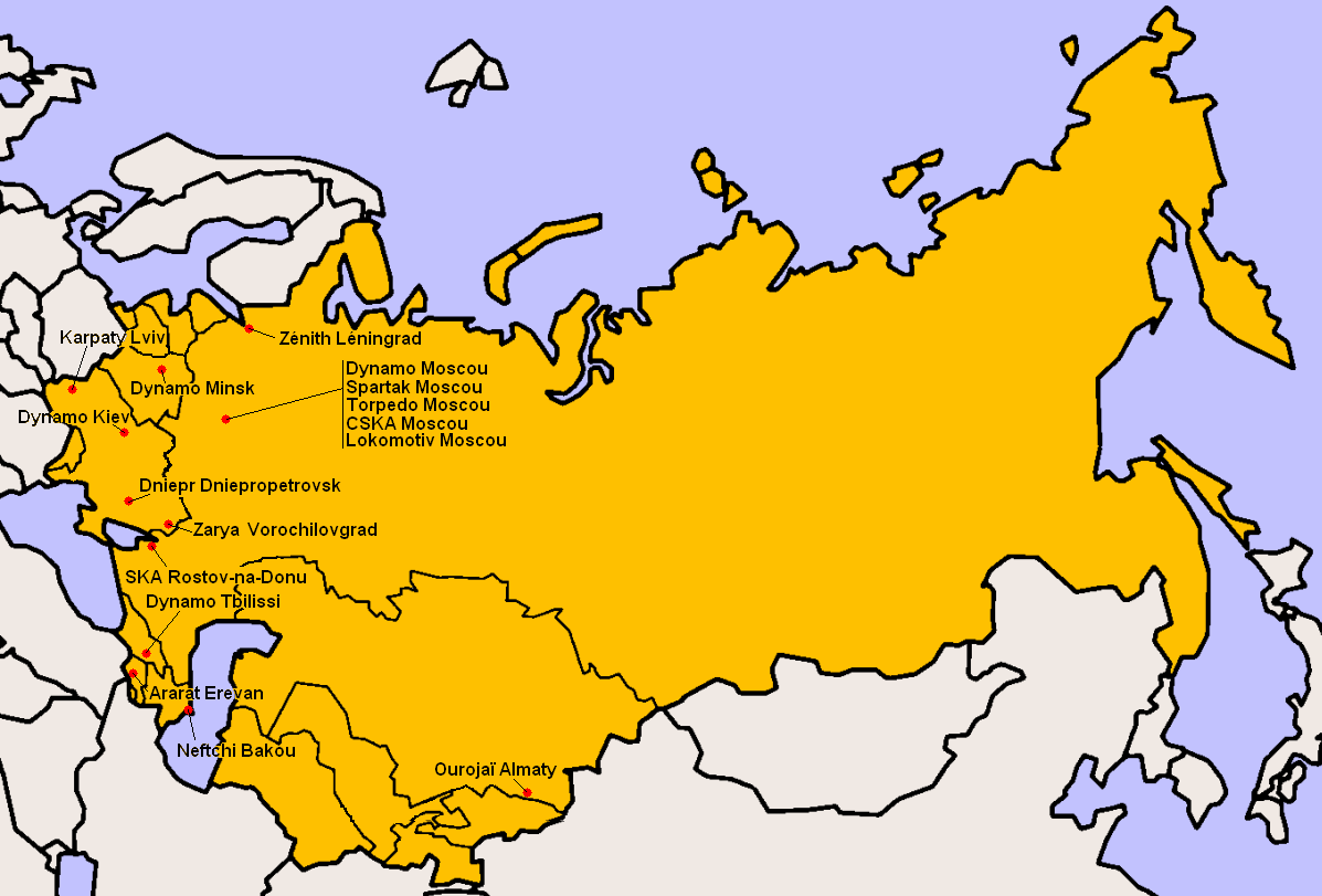 Clubs participants à la Classe A 1972.